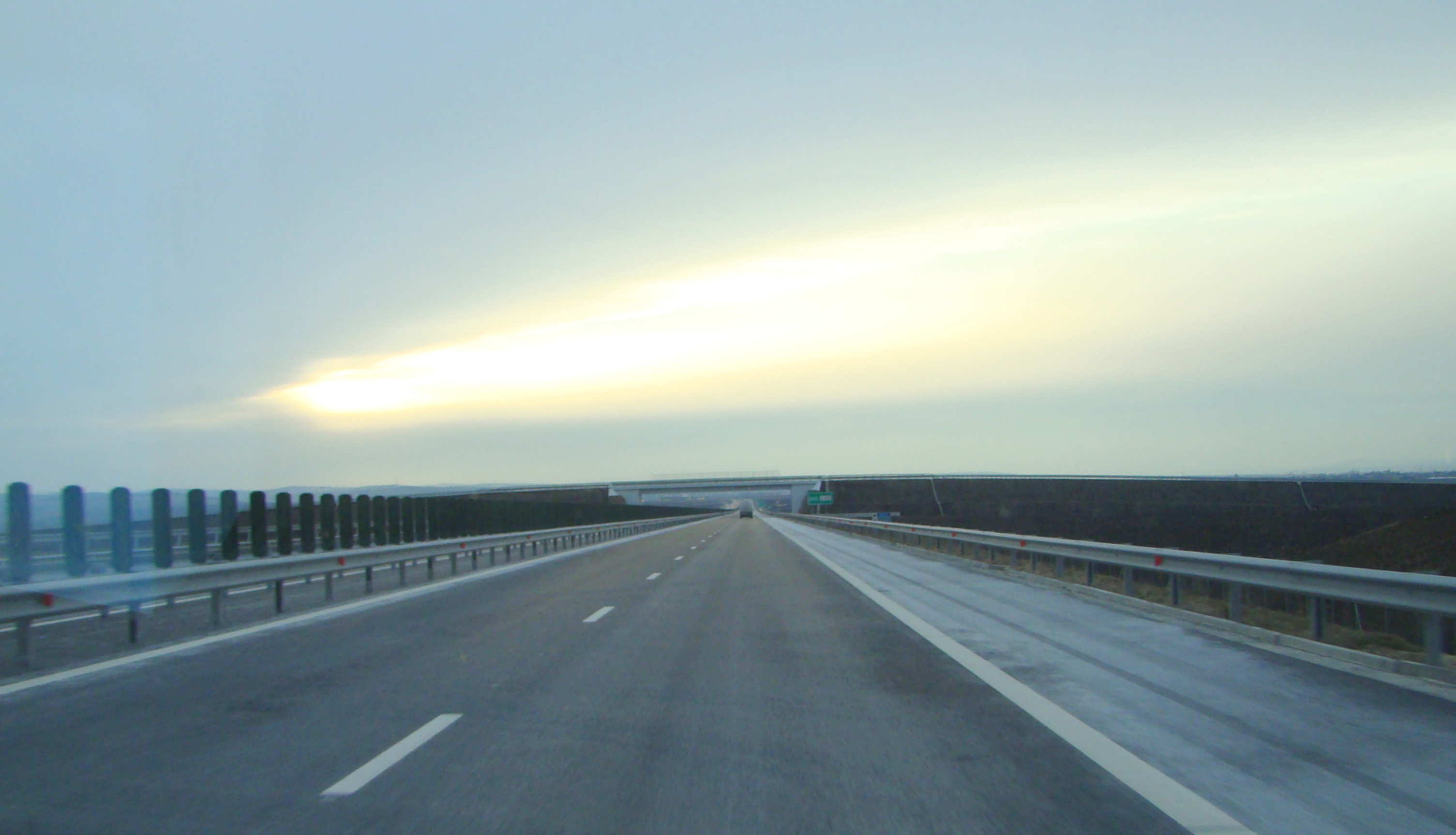 Autostrada A3. tronsonul Ungheni-Iernut